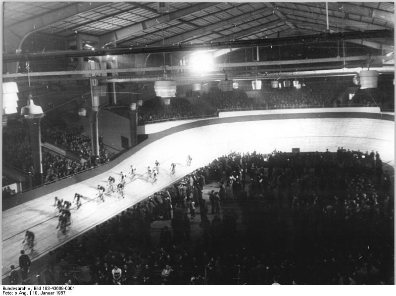 Berlin, Bahnradrennen, Übersicht Zentralbild Fu-Wen 10.1.1957 Winterbahn-Premiere in Berlin Am Mittwoch, dem 8. Januar 1957, wurde in der Berliner Werner-Seelenbinder-Halle die Winterbahn-Premiere durchgeführt. UBz: Eine Übersicht während des Rennens.